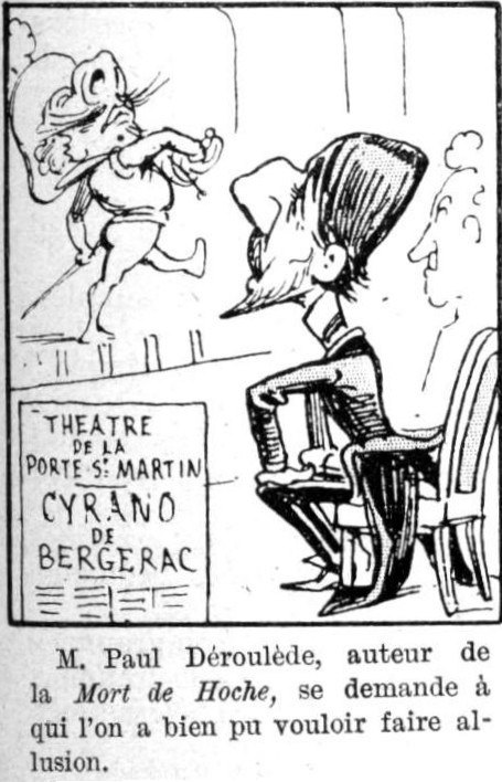 Revue Le Monde moderne (1898), caricature de Moloch.